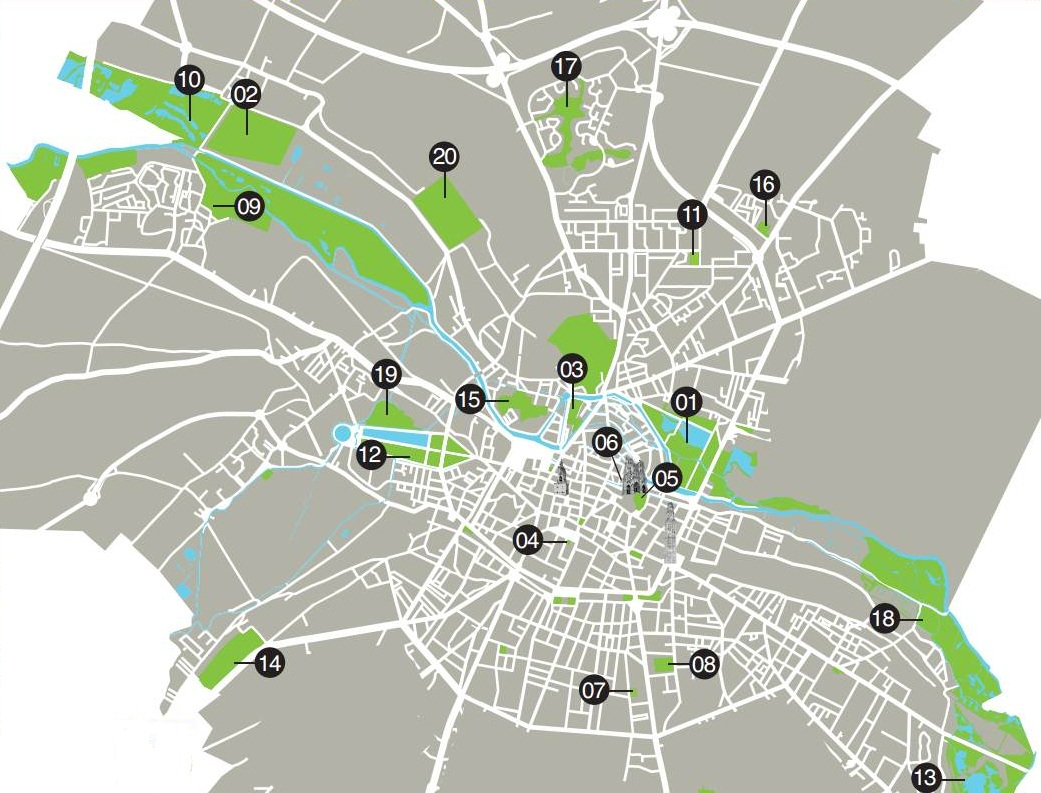 Les principaux parcs de la ville d'Amiens (Picardie)